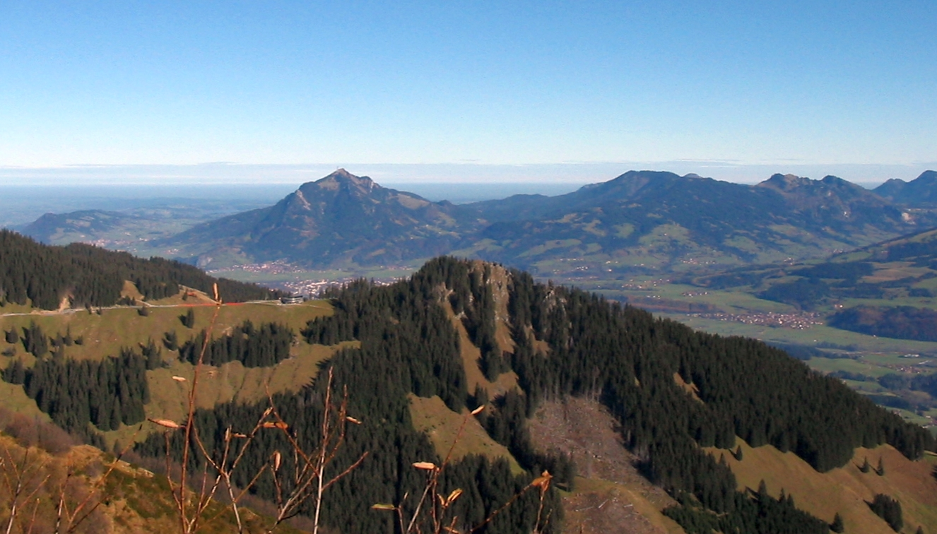 Bolsterlanger Horn in Bildmitte, im Hintergrund der Grünten